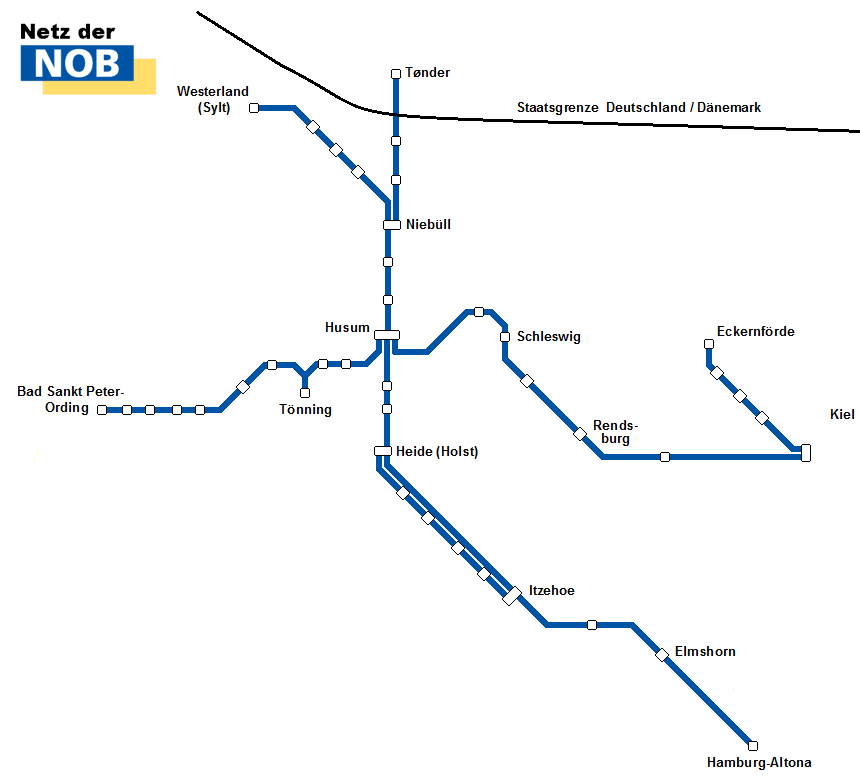 Netz der NOB im Jahr 2010